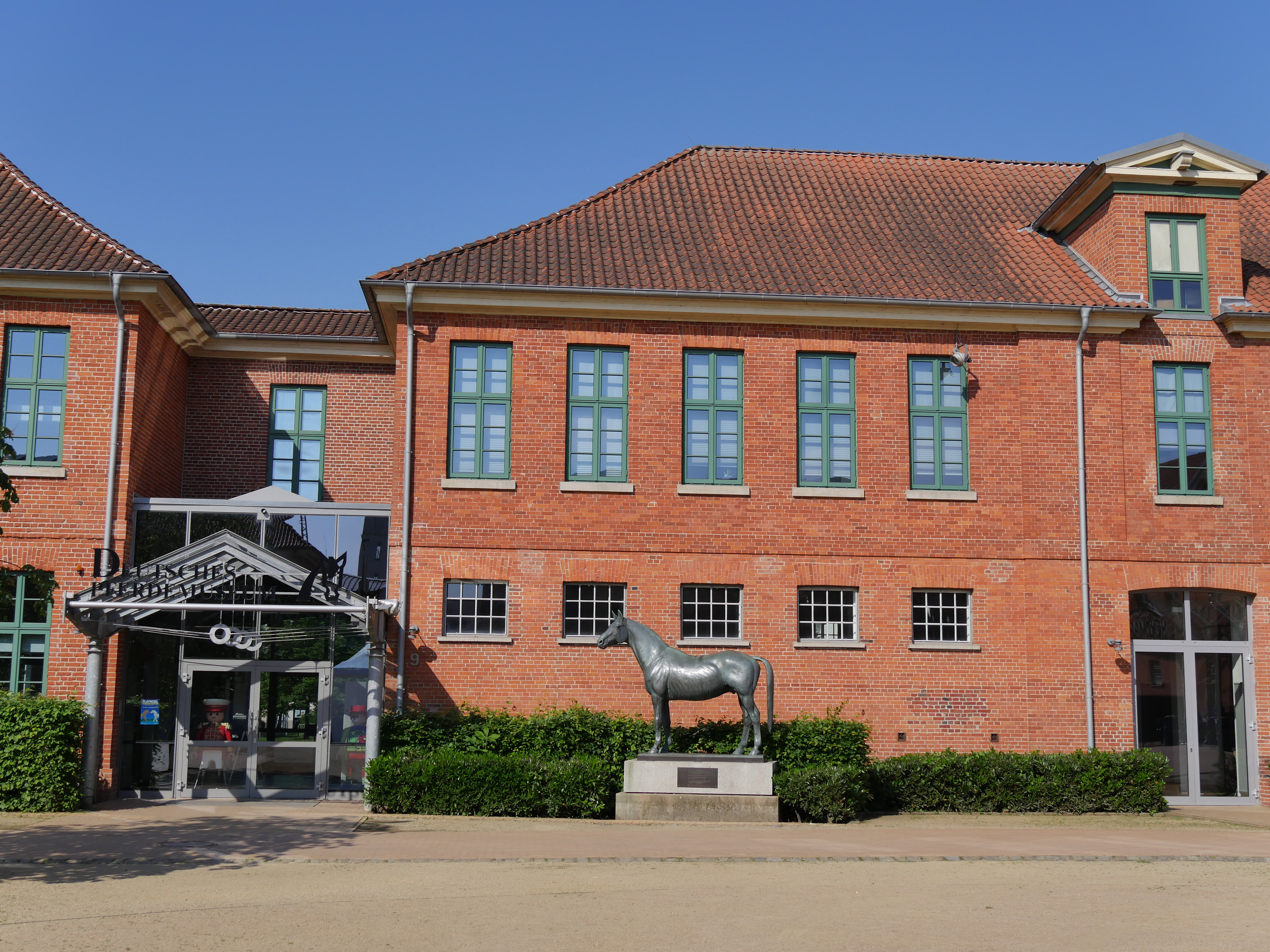 Eingang des Pferdemuseums in Verden mit der Tempelhüterstatue